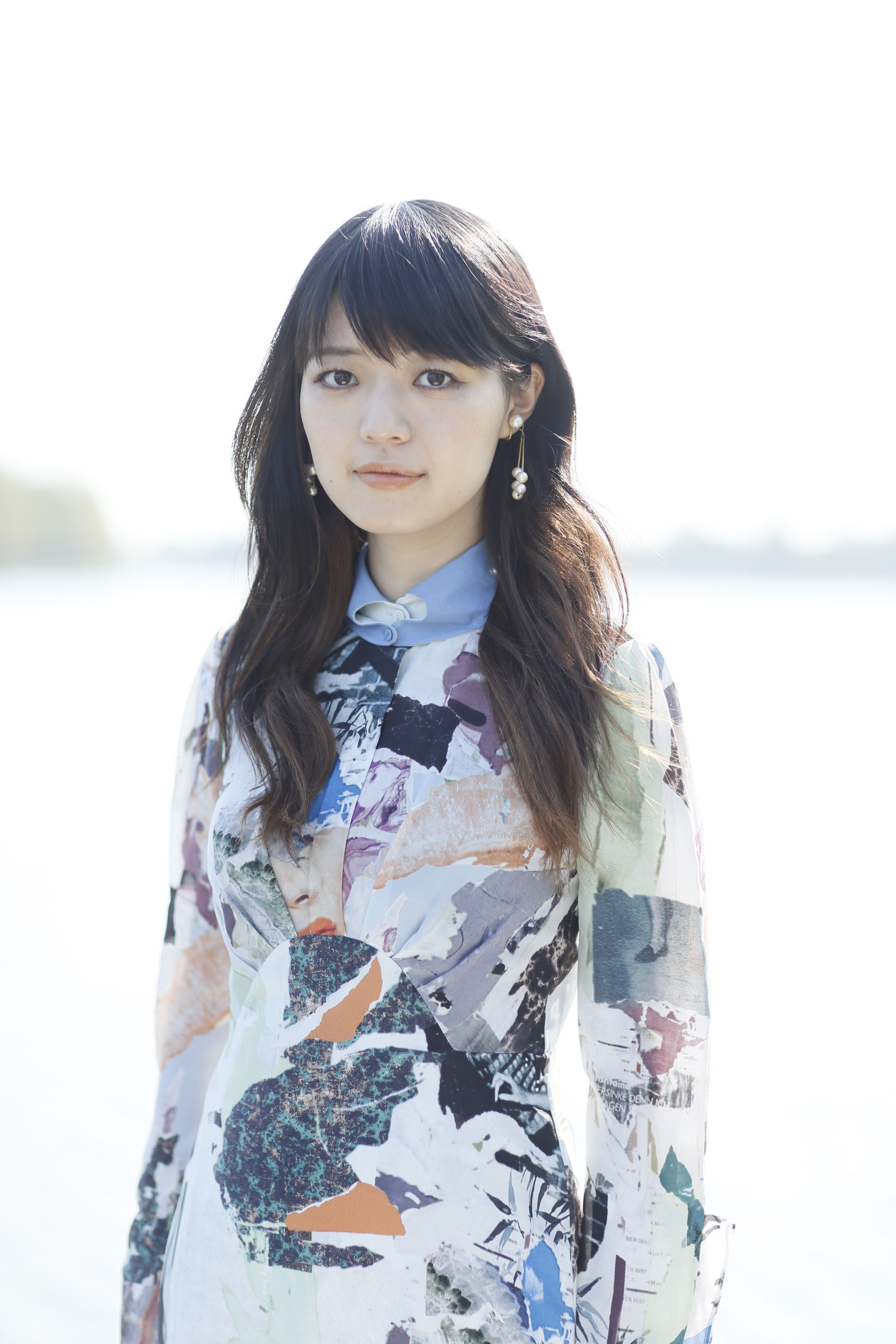 2013年